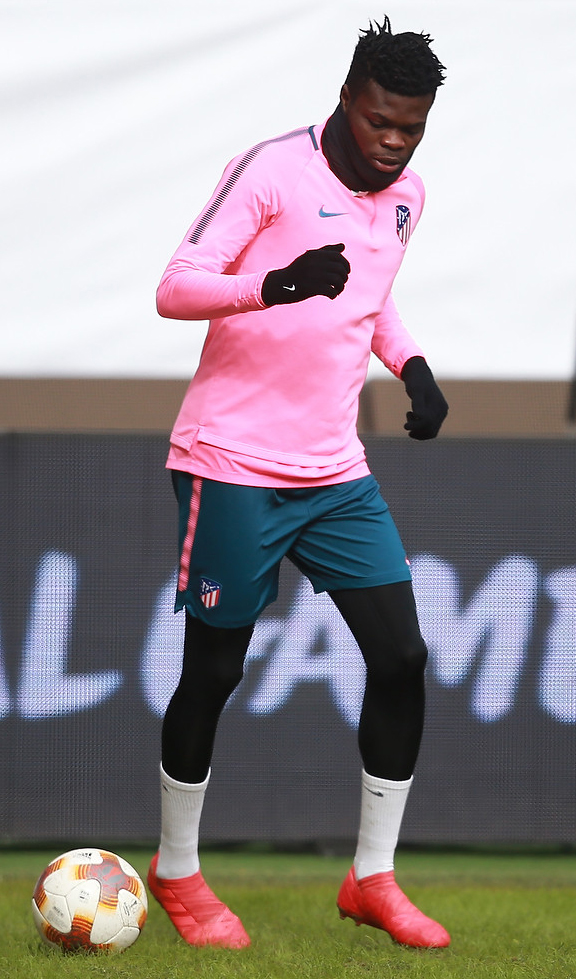 Тренировки «Локомотива» и «Атлетико» перед очной встречей